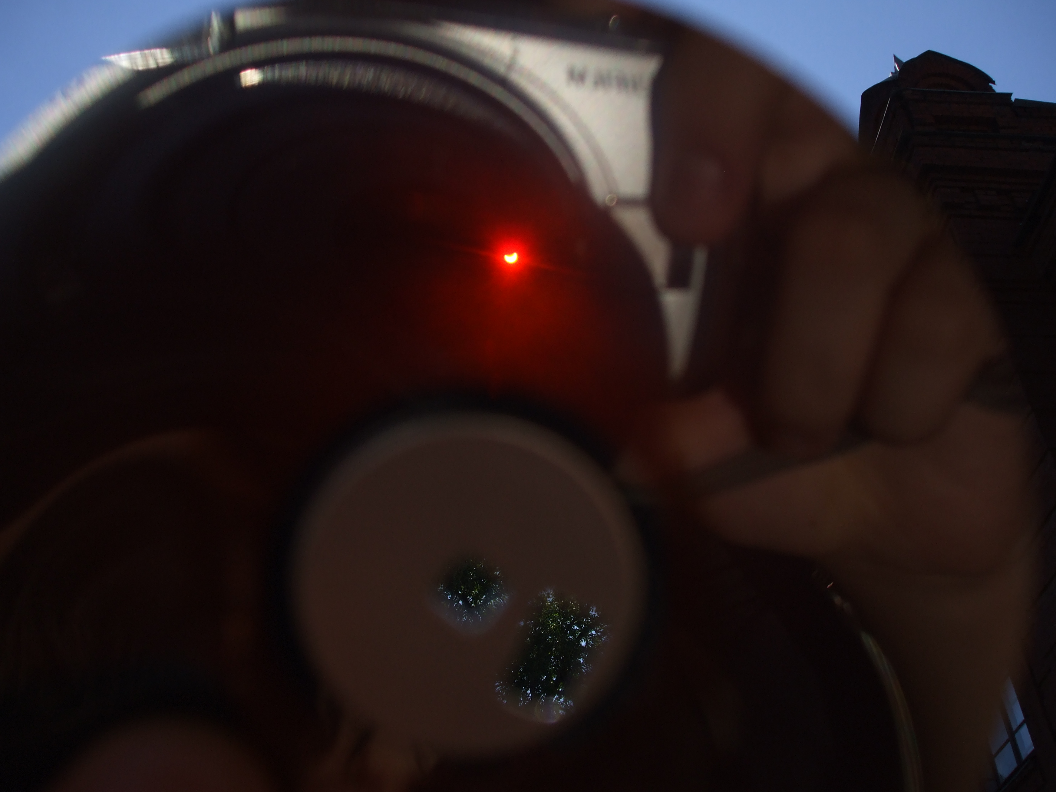 частичное солнечное затмение, Санкт-Петербург, 1 августа 2008